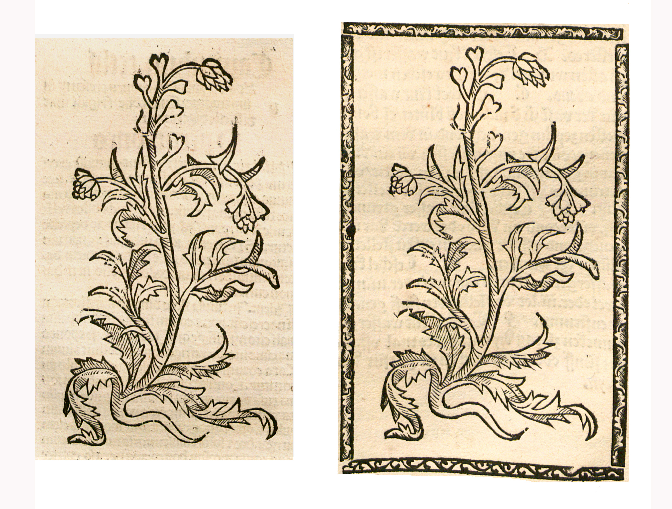 Abbildung vonː Teschel Krut (Capsella bursa-pastoris)